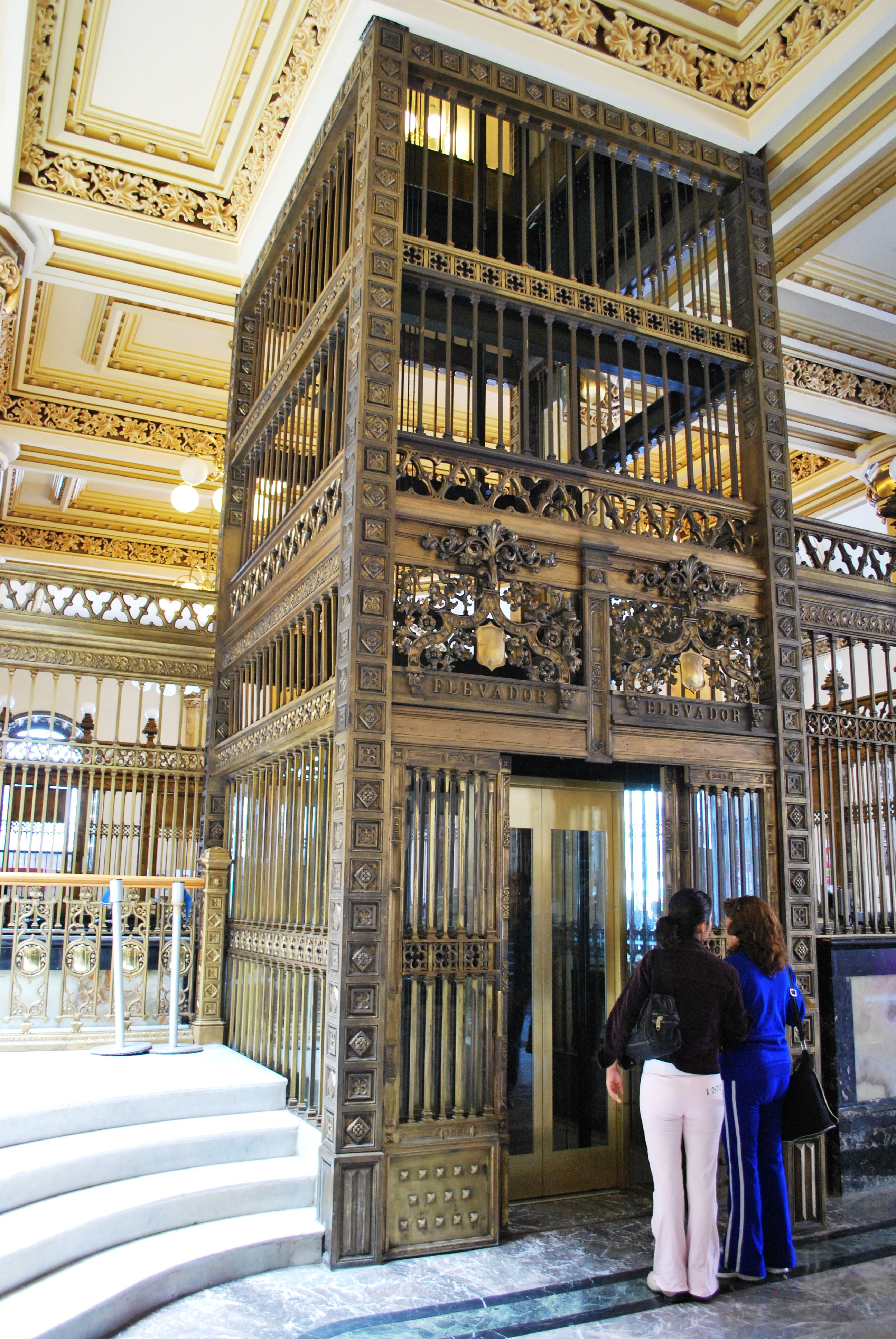 ELEVADOR INTERNO EN EL PALACIO POSTAL